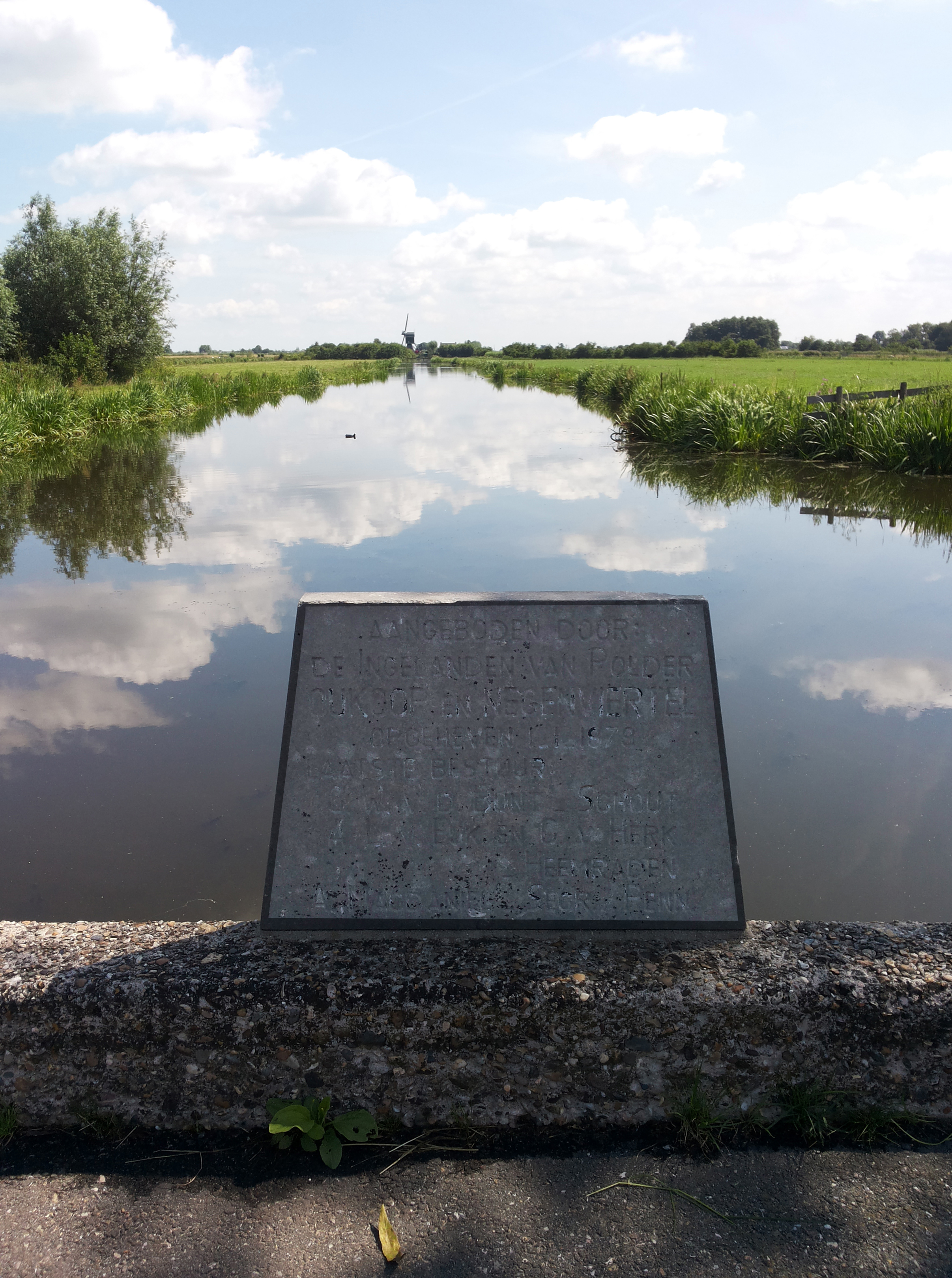 Opheffing Waterschap Polder Oukoop en Negenviertel. Tekst op de steen: Aangeboden door de Ingelanden van Polder Oukoop en Negenviertel. Opgeheven 1-1-1979. Laatste bestuur: C.W v.d. Bunt, (Schout), A.L. v. Eijk en C. v. Herk, (Heemraden), A. Macdaniel (Secretaris. Penningmeester). Het waterschap werd opgeheven en ging over naar Waterschap Gouwelanden. Het statenbesluit van 16 maart 1978 ging in op 1-1-1979. (Ingelanden zijn het hoogste gezag in kleine waterschappen)